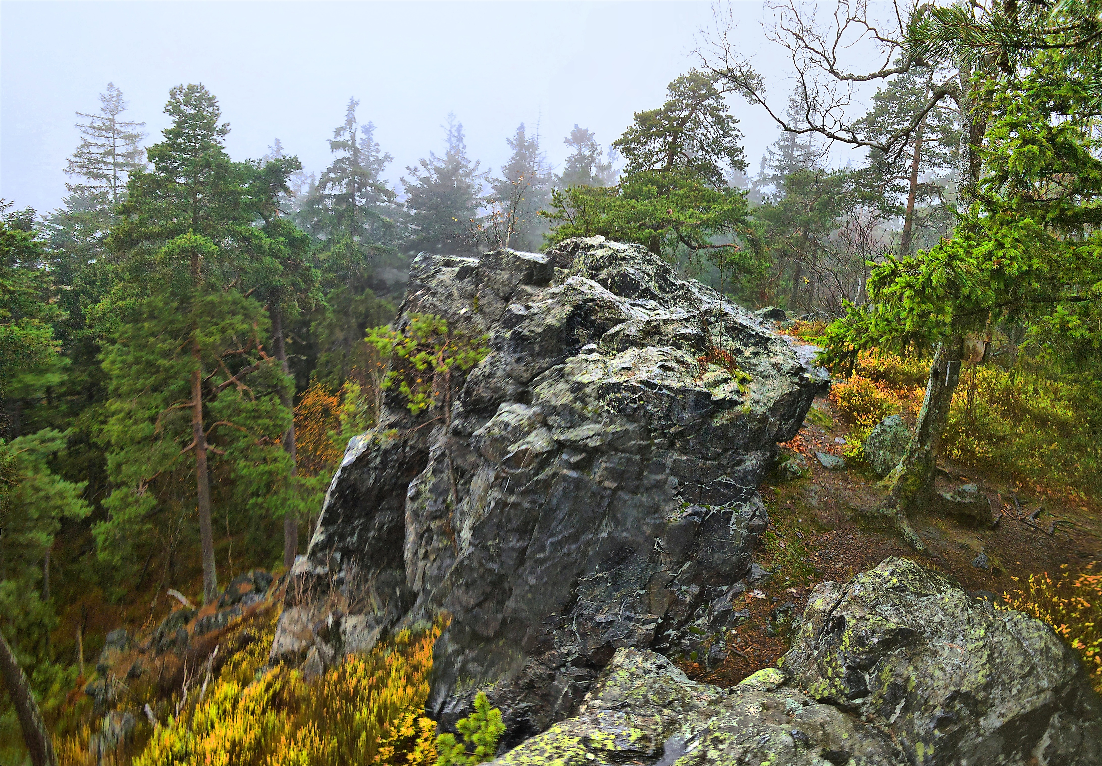 Vrcholová skála hory Nad Maráskem (801 m) v Brdech.